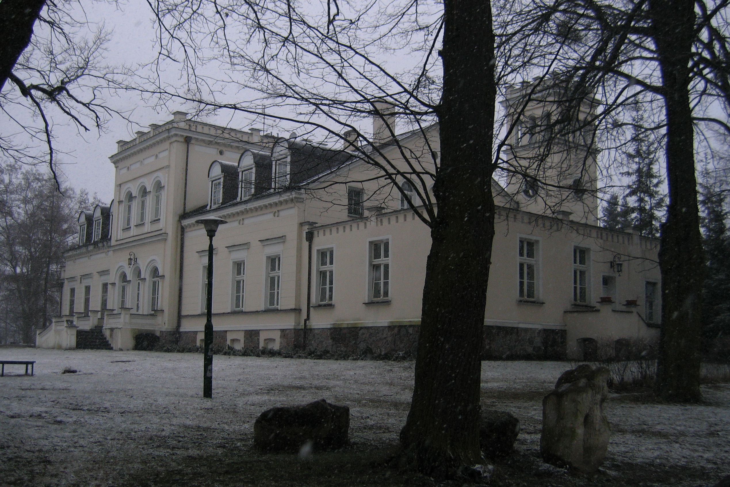 Pałac w Skokach